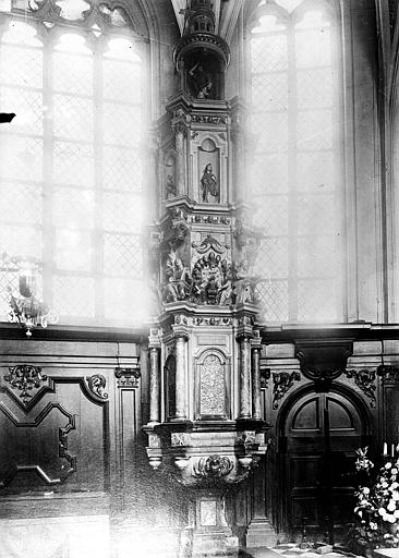 Répositoire.